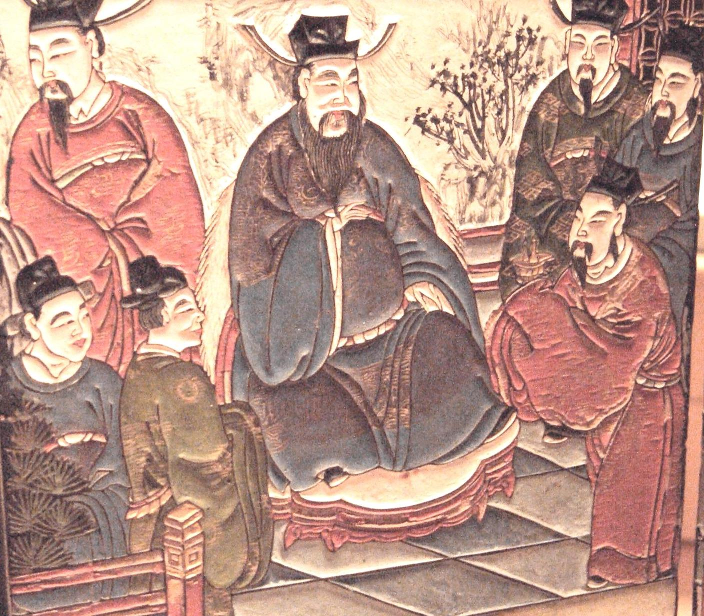 Screen in Coromandel lacquer technique (Detail), Qing Dynasty